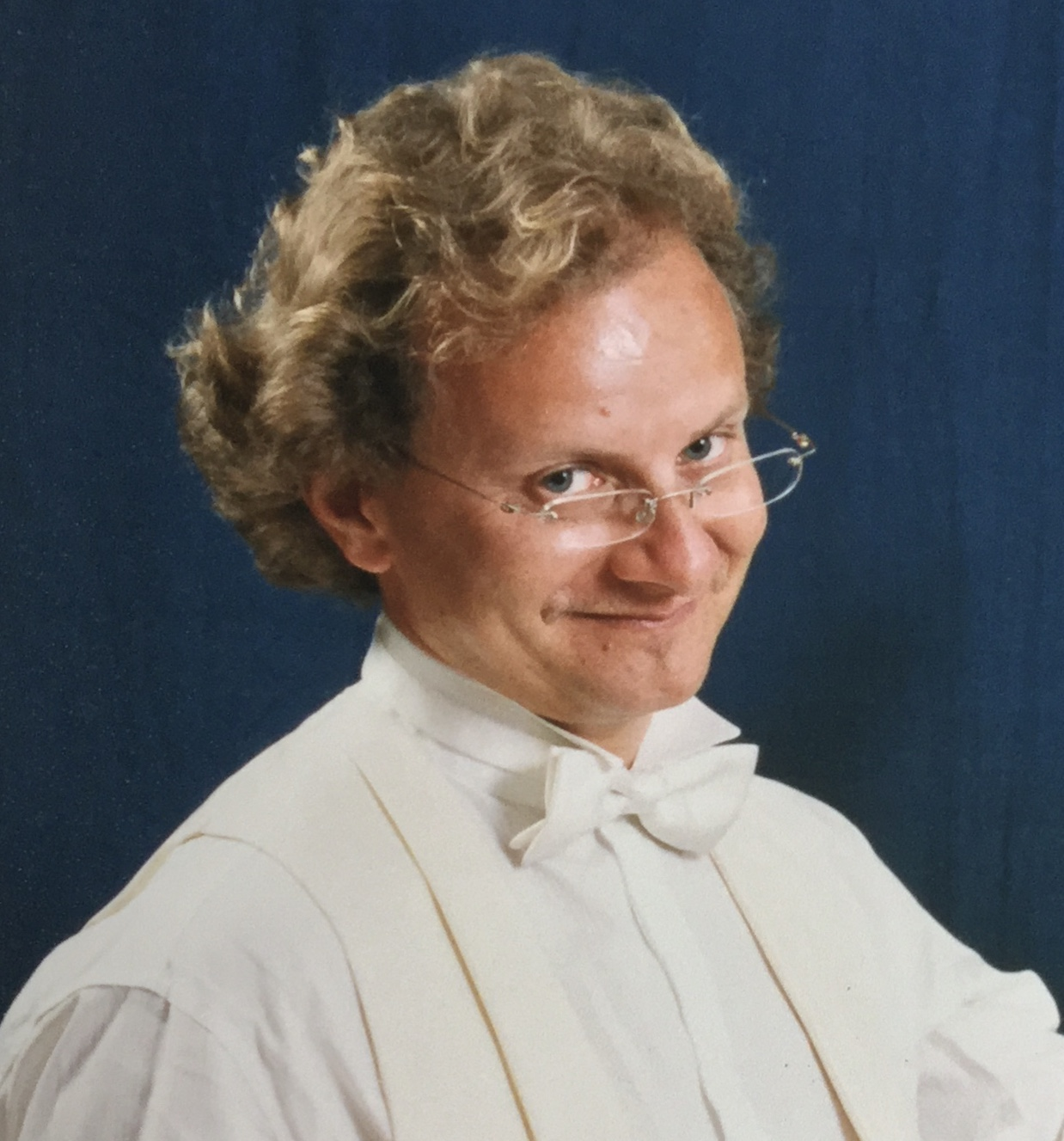 Alessandro Baccini